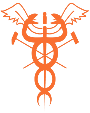 Caducée, logo du Cercle Solvay de l'Université Libre de Bruxelles